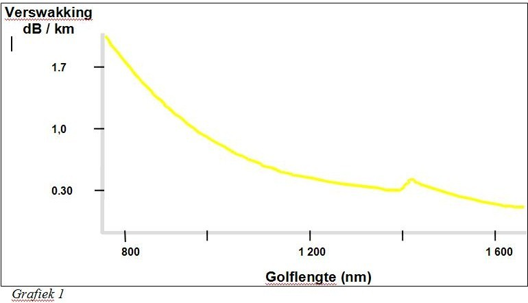 Verswakkingskurwe van die verlies van lig in optiese vesel